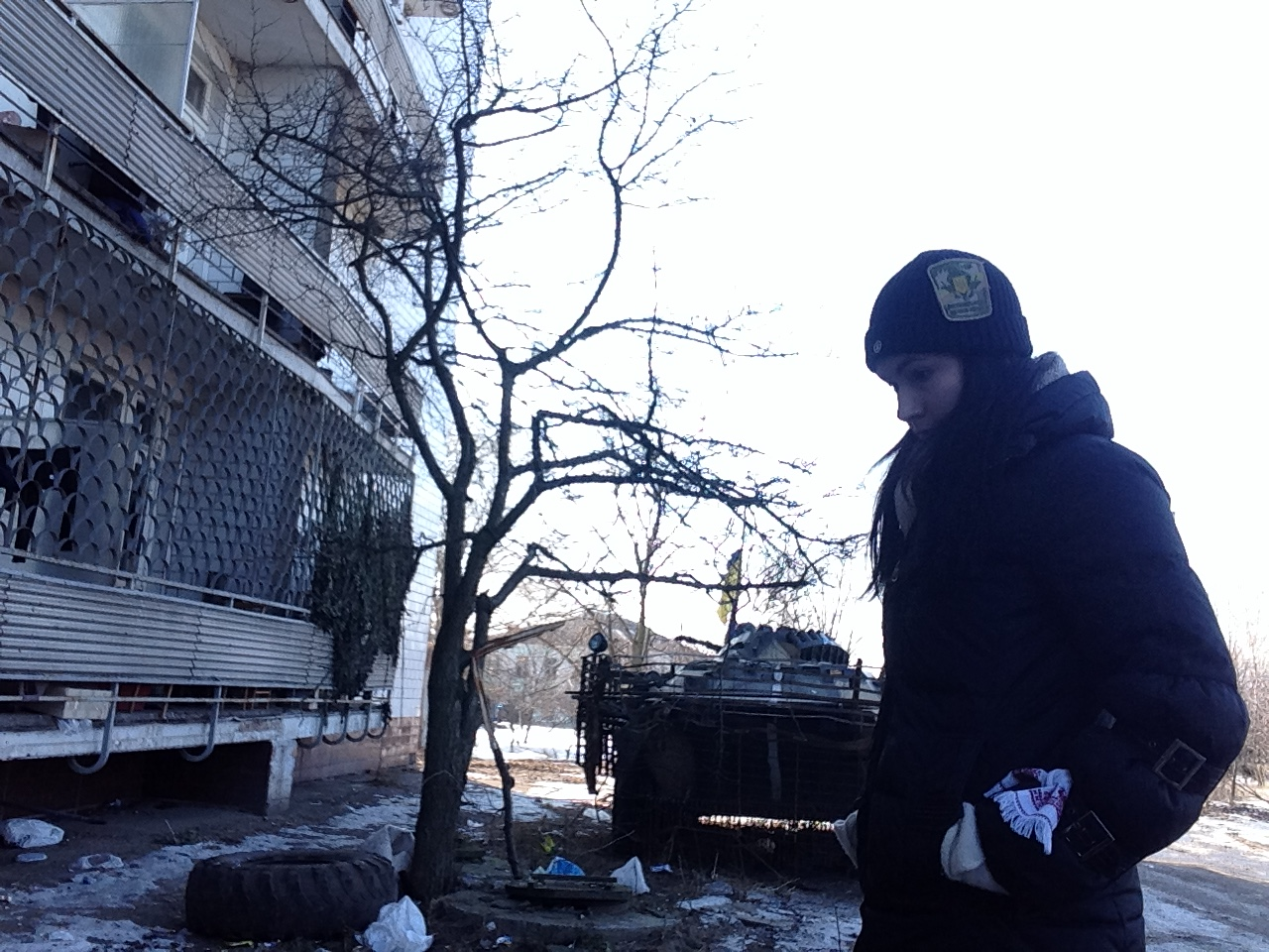 Надія Васiна: підтримка військових на фронтi